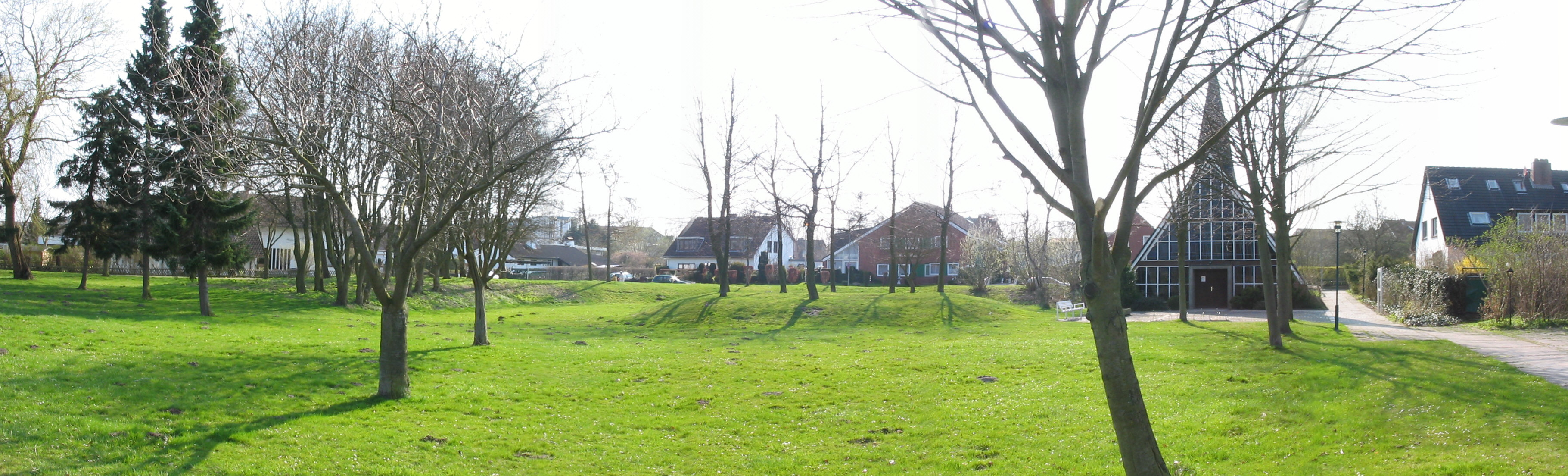 Wittenwiewerbarg Panorama